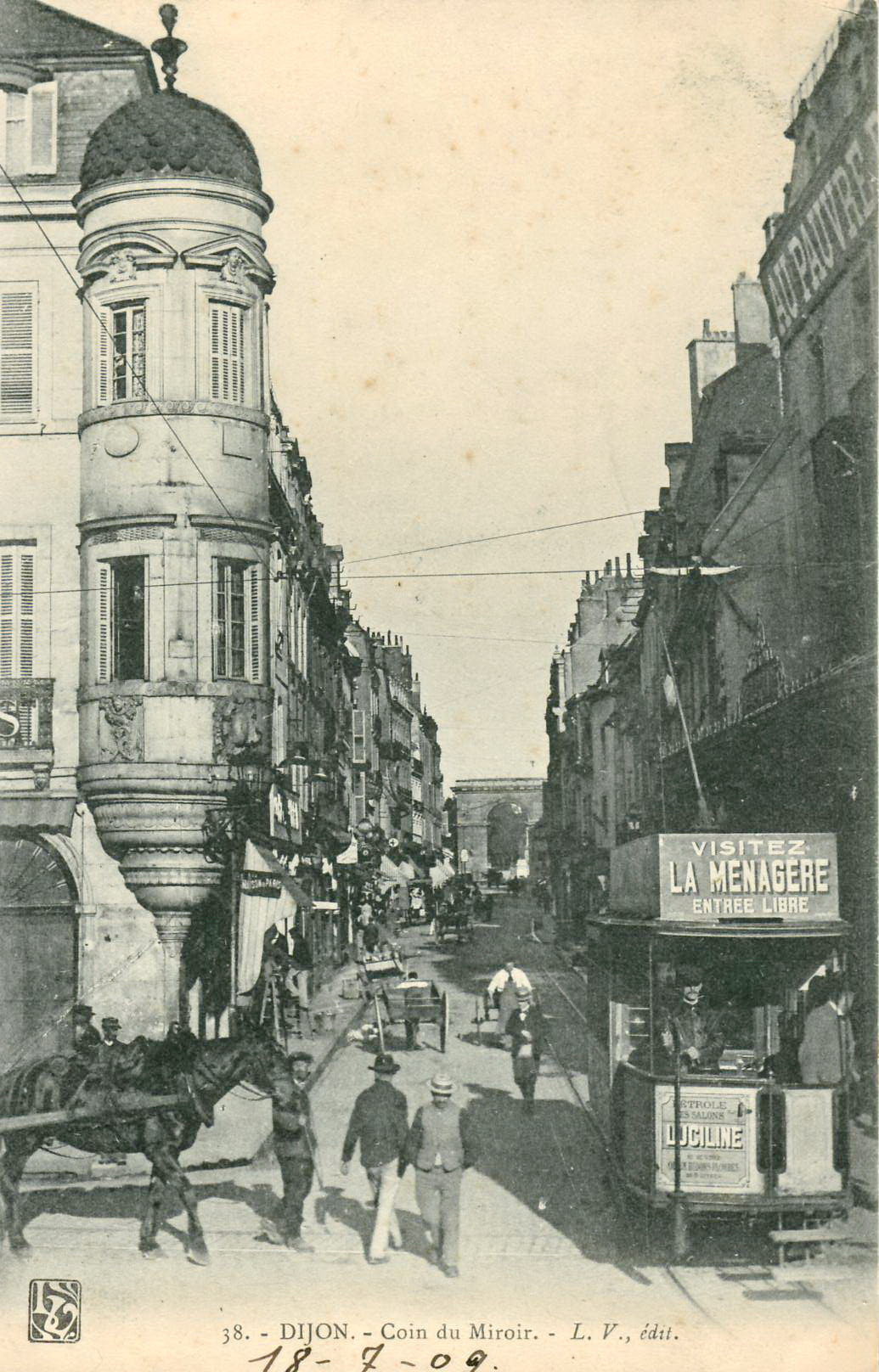 Carte postale ancienne éditée par L. V., édit., n°38 : DIJON - Coin du Miroir